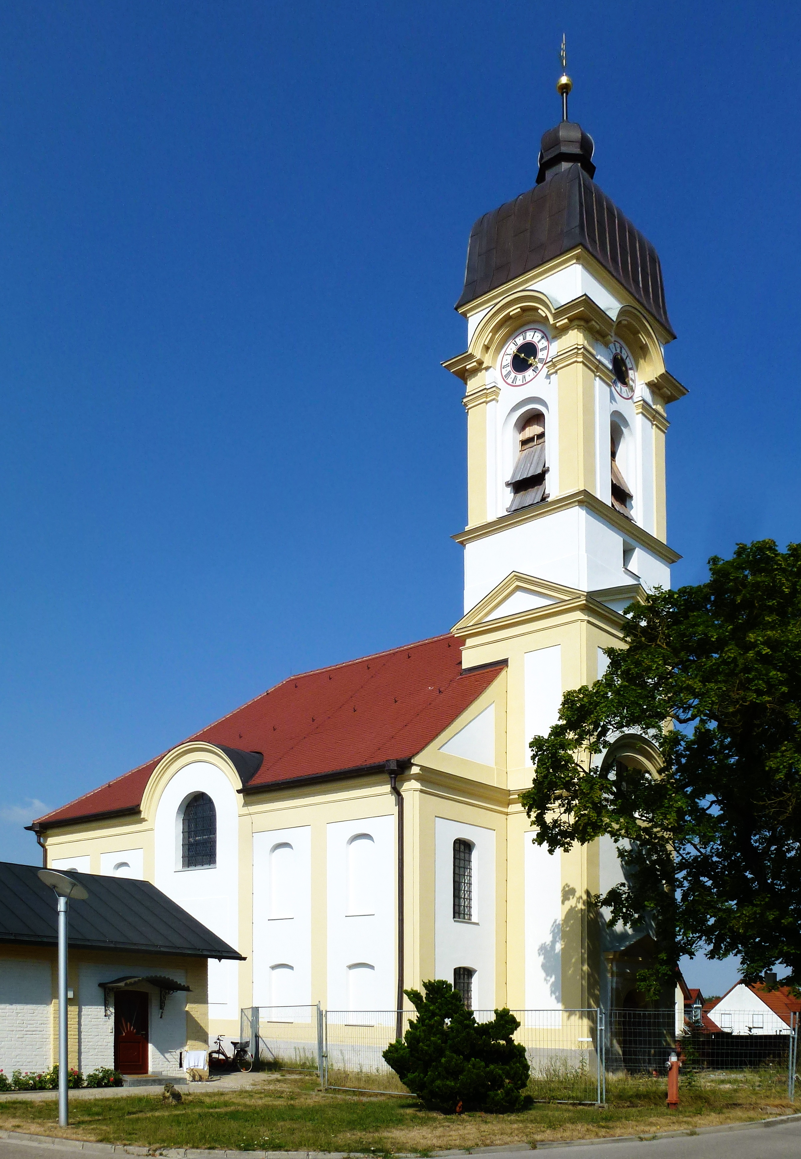 Schönbrunn, Kirchweg 4: Katholische Filialkirche Hl. Kreuz. Ansicht aus SW